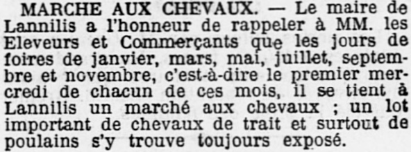 Le marché aux chevaux de Lannilis en 1910 (journal L'Ouest-Éclair du 6 juillet 1910).